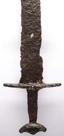 Epée viking, Musée de Denain.